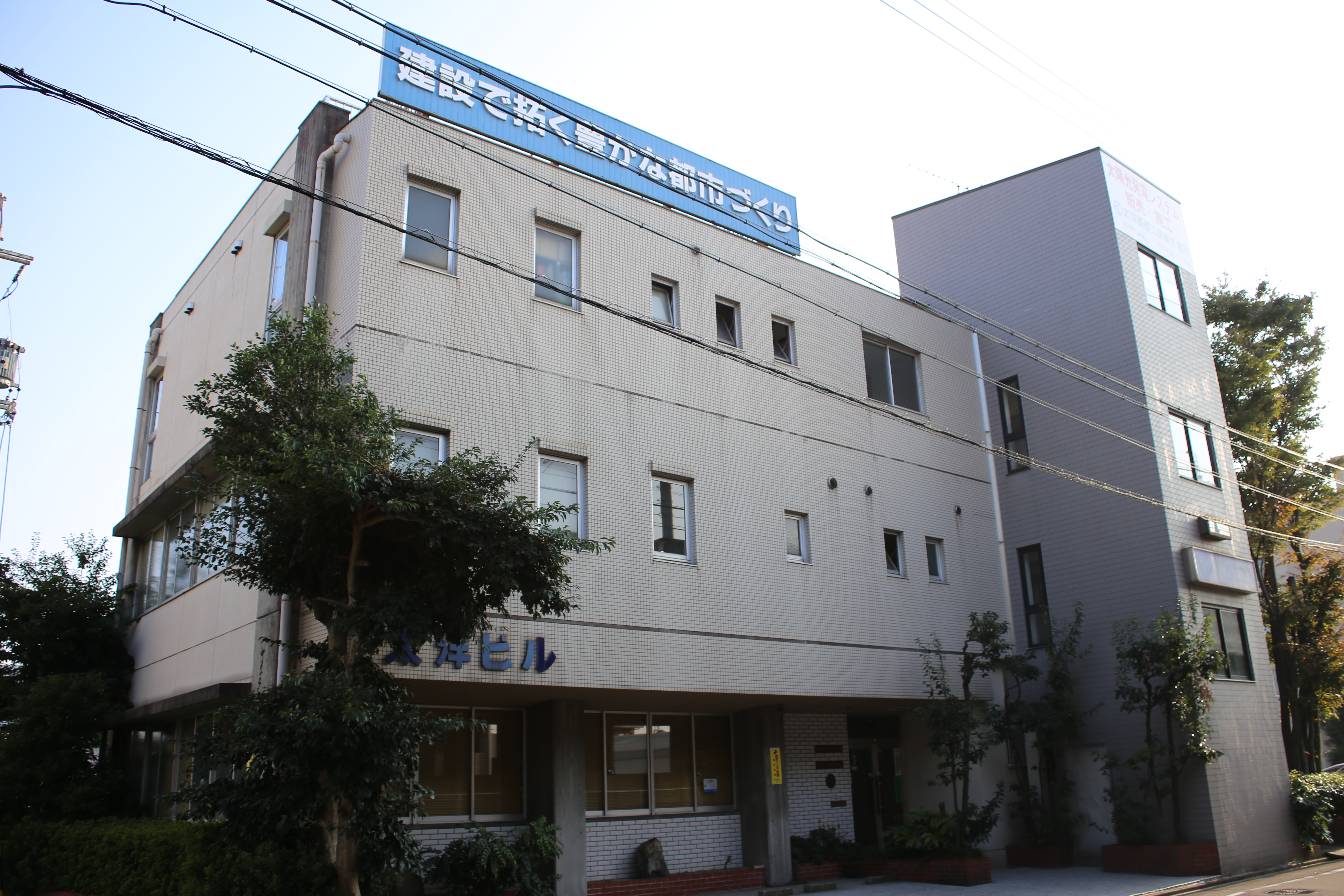 名古屋市中川区柳森町の太洋基礎工業本社を東側公道北側より撮影